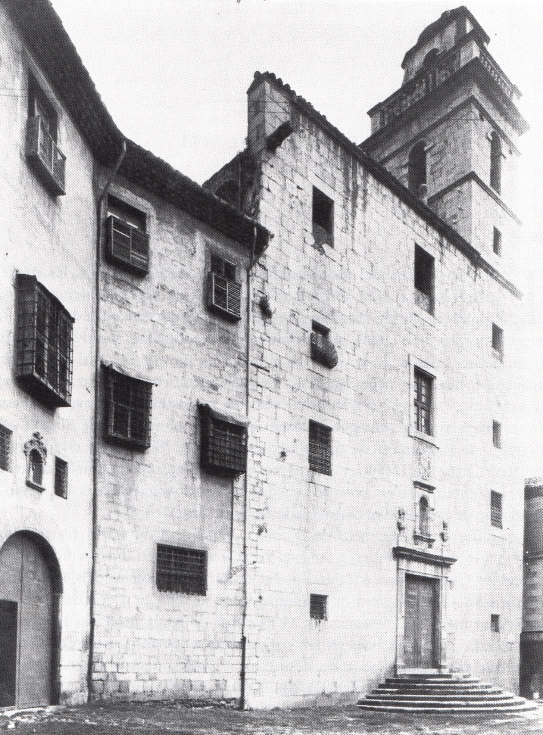 Fachada de la iglesia y de monasterio de Santa María de Cadinsen el Mercadal de Gerona, antes de julio de 1936.